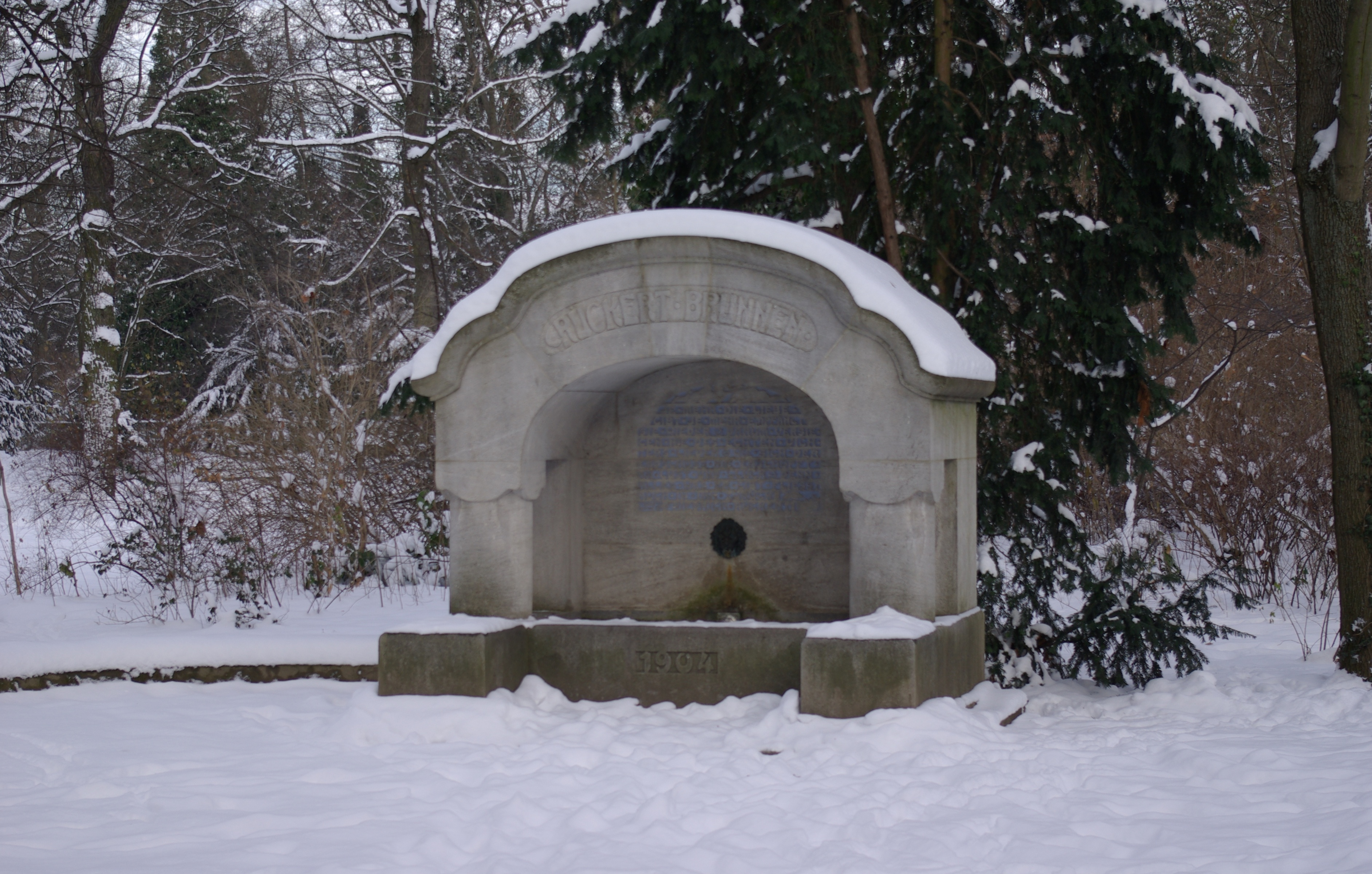 Rückert-Brunnen im Erlanger Schlossgarten